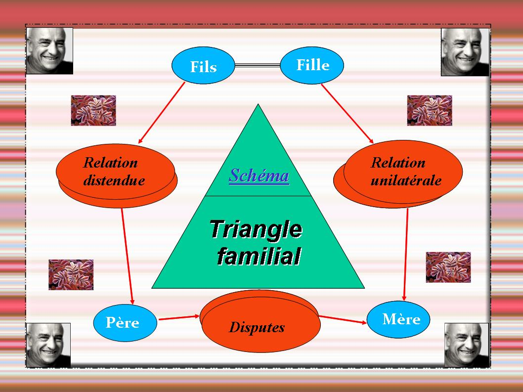 Schématisation du triangle relationnel familial